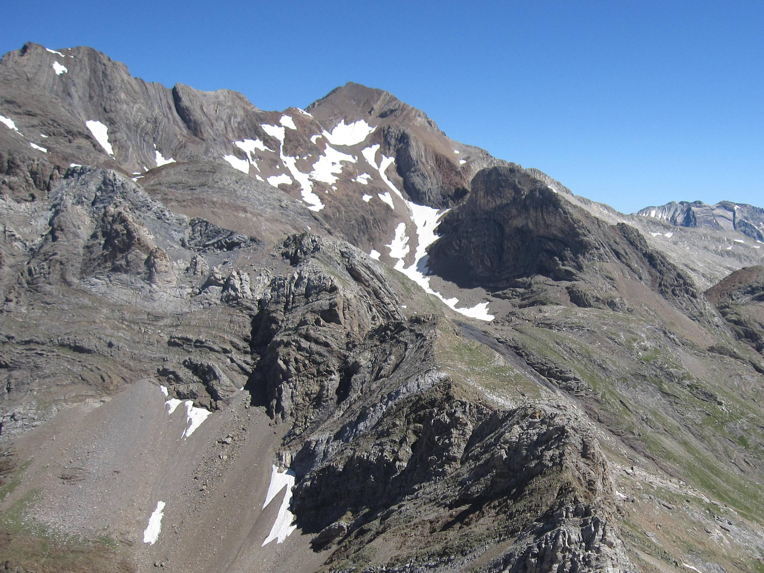 Pico Posets visto desde la cima del pico de la Forqueta, Pirineos españoles.